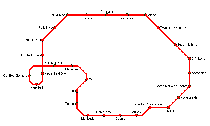 Disegno della linea 1 della metropolitana di Napoli